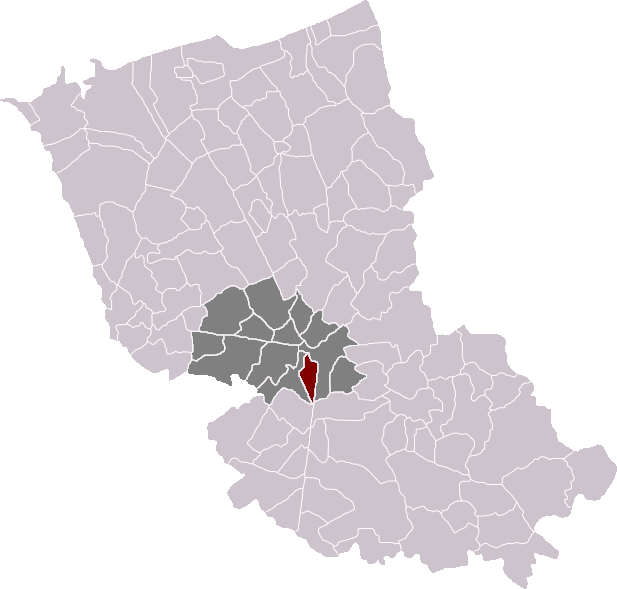 Locatie gemeente Okselare in arrondissement Duinkerke. Zelfgemaakt. Location of Oxelaëre municipality in the arrondissement of Dunkirk. Self made. Localisation de la commune d'Oxelaëre dans l'arrondissement de Dunkerque. Fait moi-même.